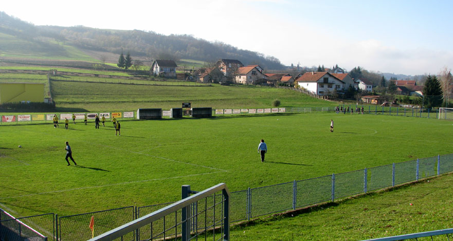 Nogometno igralište u Pušći, Zagrebačka županija